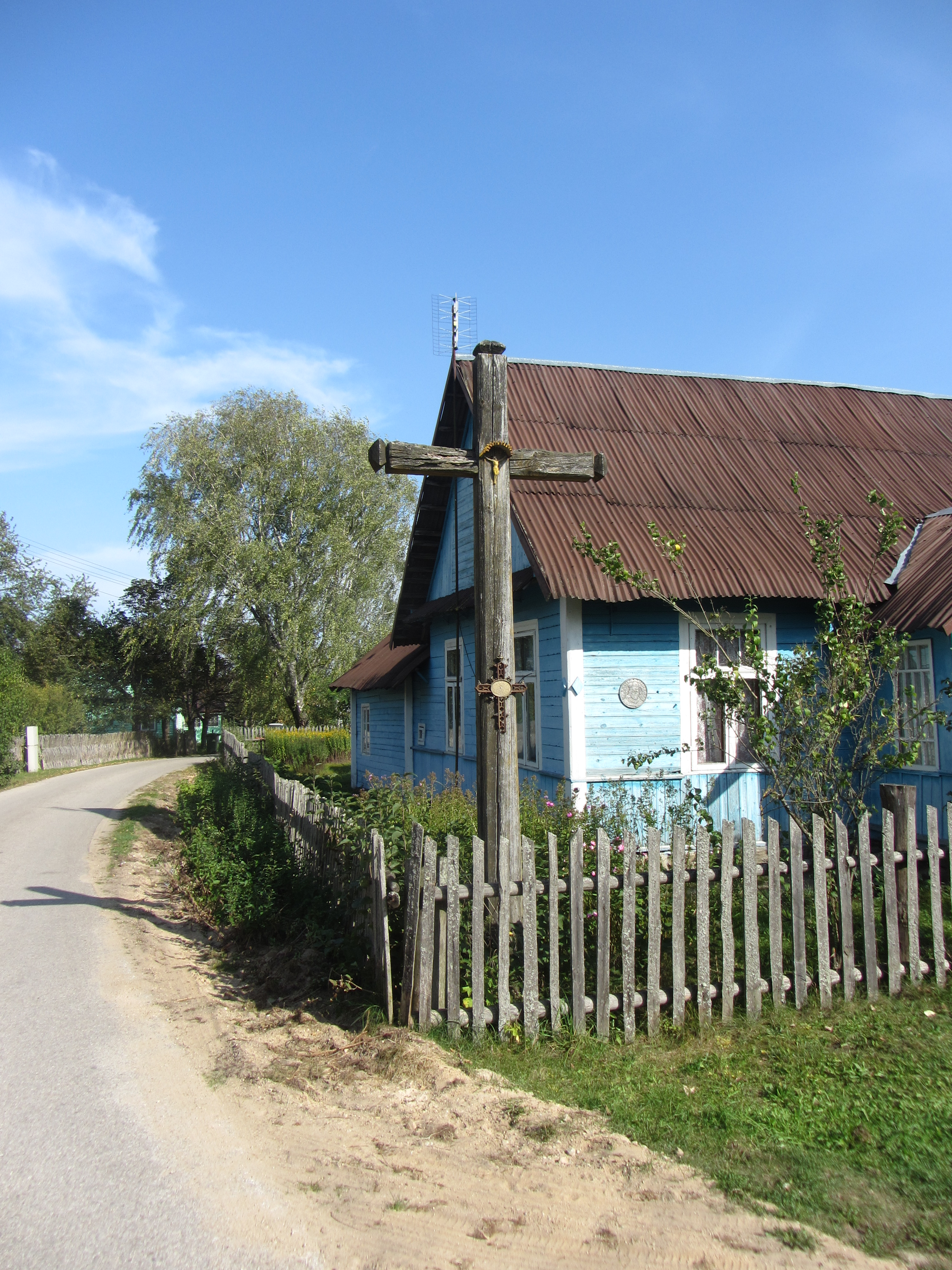 Puvočiai 65344, Lithuania